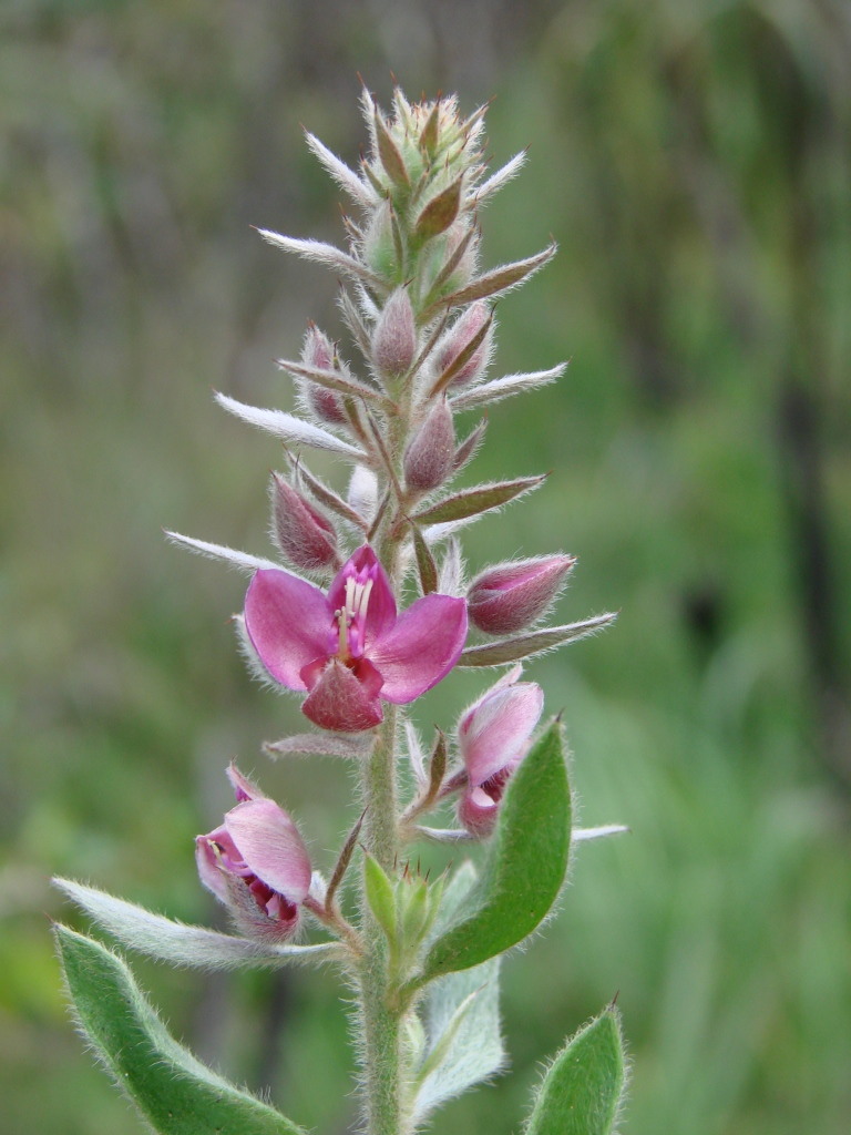 Krameria tomentosa A.St.-Hil. - KRAMERIACEAE - Jardim Botânico de Brasília - Brasília - Distrito Federal - Brasil.